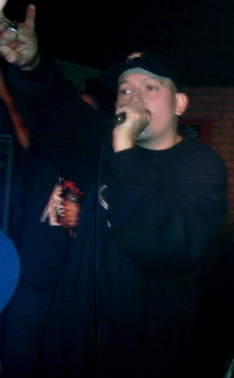 Capaz es un rapero español. Concierto año 2004 en Lugo